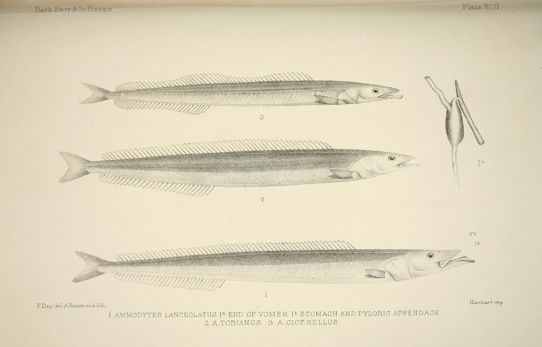 •f a oq i& Y/ .• - m w C5 .^ P S w pu Ph .! o £ o J ^ Ph Q £ .! ffi CO o D .; j £ 1-3 o W E-i tf cQ H rR O crl O w . s CO o . to &H 13 o £ Q . 55 5 o ci Eh CQ H CM . i-P o H O 55 .i i-q CO H tn .- Q O S 2 .